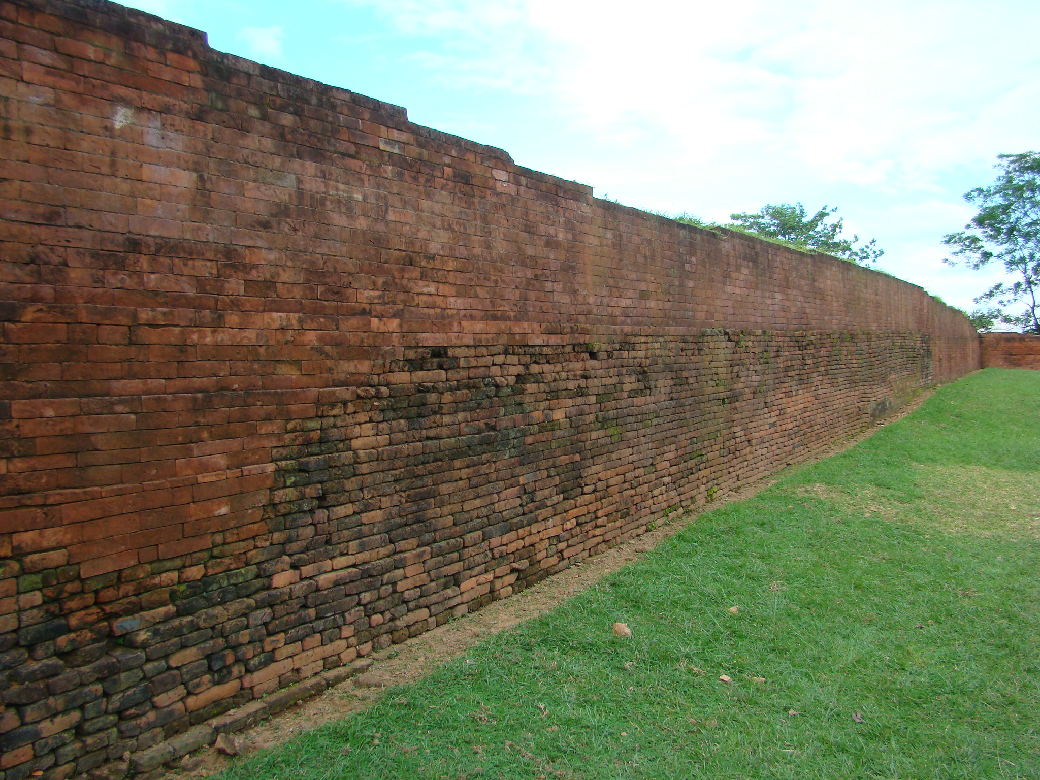 Mahasthangar Govinda Bhita Bogra Bangladesh